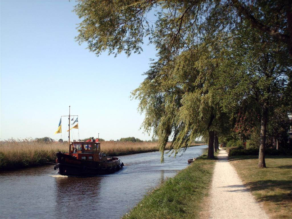 Engelenvaart (canal in Heerenveen)